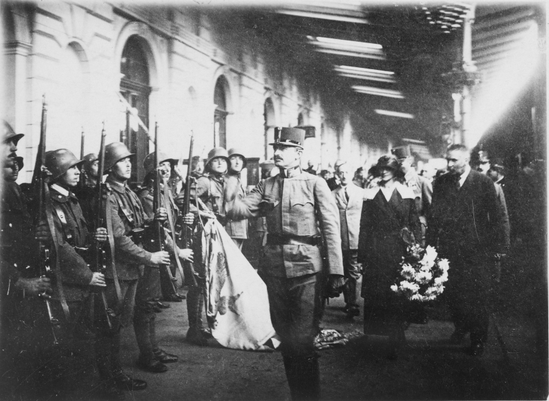 El exemperador austrohúngaro Carlos de Habsburgo, seguido de su esposa Zita, pasa revista a una guardia de honor en la estación de Győr durante su segundo intento de restauración en octubre de 1921